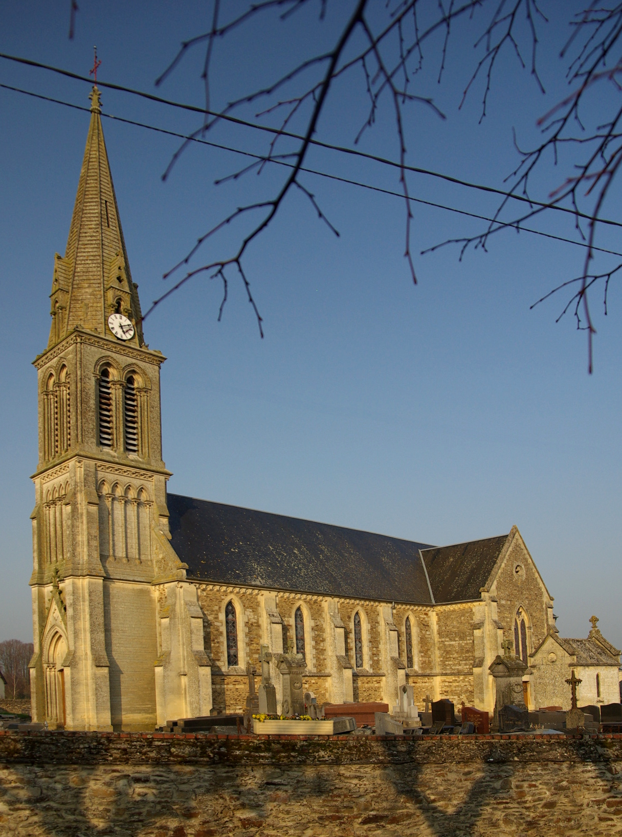 L'église Saint-Melaine, Banneville s/Ajon, Calvados.